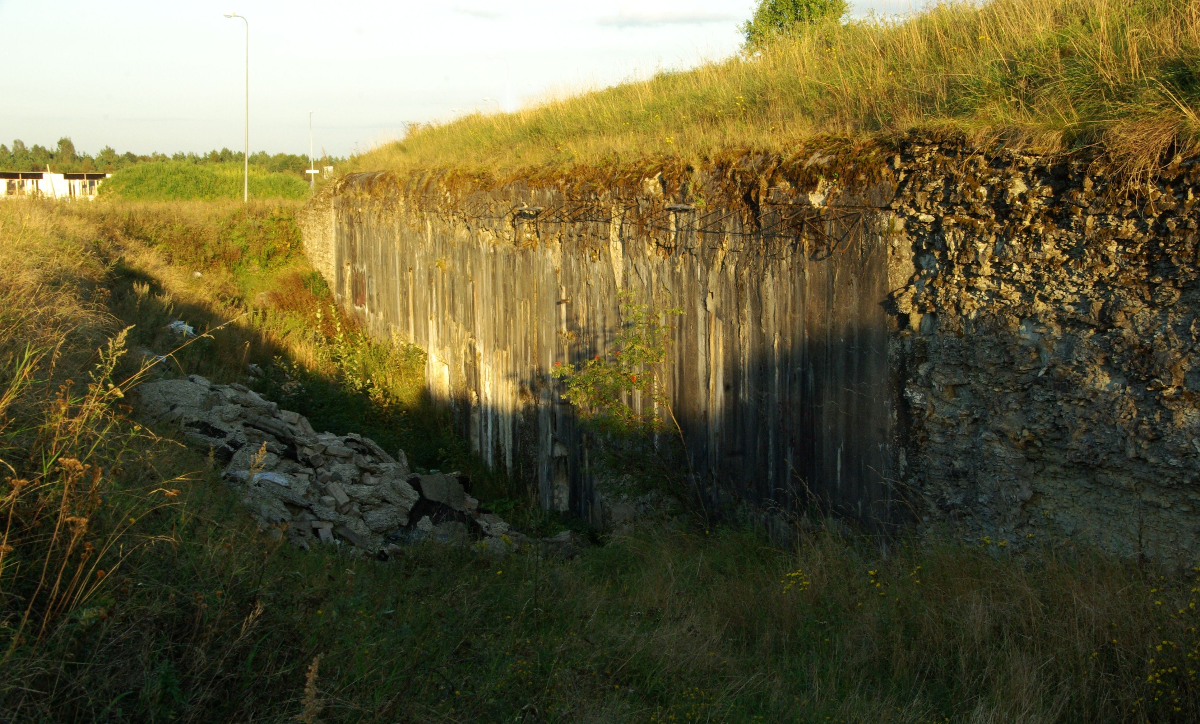 Peeter Suure Merekindluse Pääsküla positsiooni rooduvarjend nr. 3, 1913-1917. a.